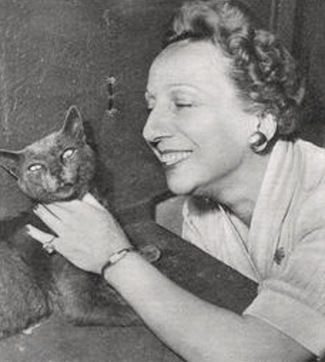 Wanda Tettoni